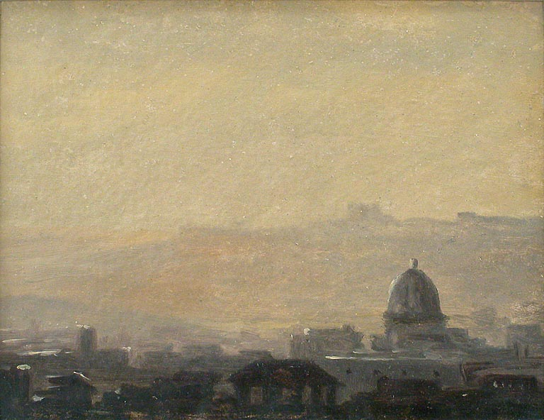 Italienische Landschaft